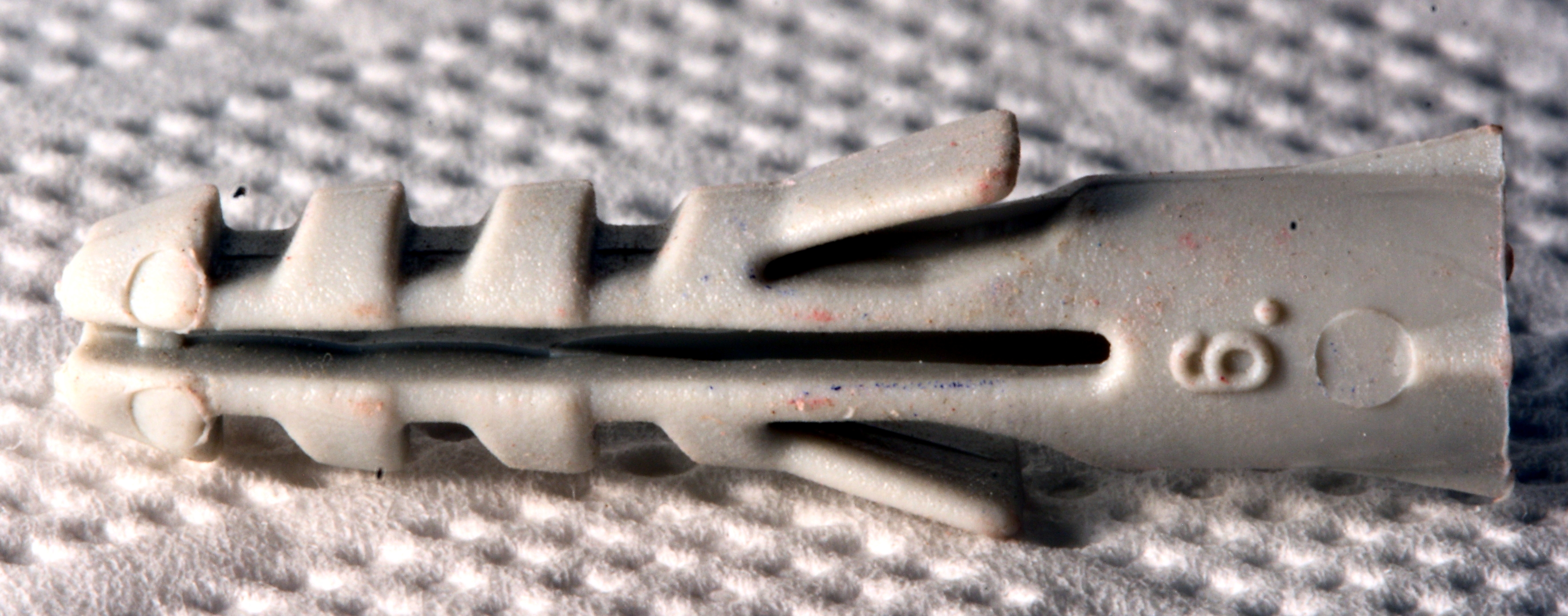 6er_Spreizdübel